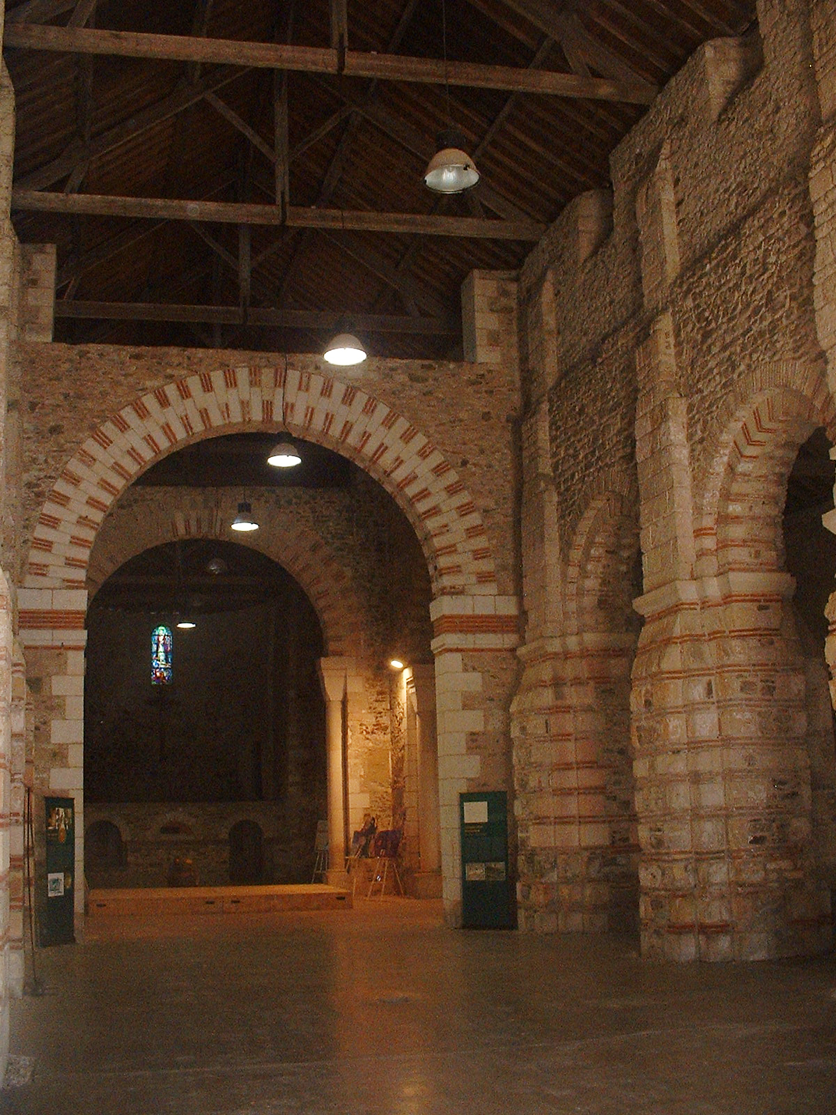 Abbatiale Saint-Philbert-de-Grand-Lieu (France) - Fonds baptismaux